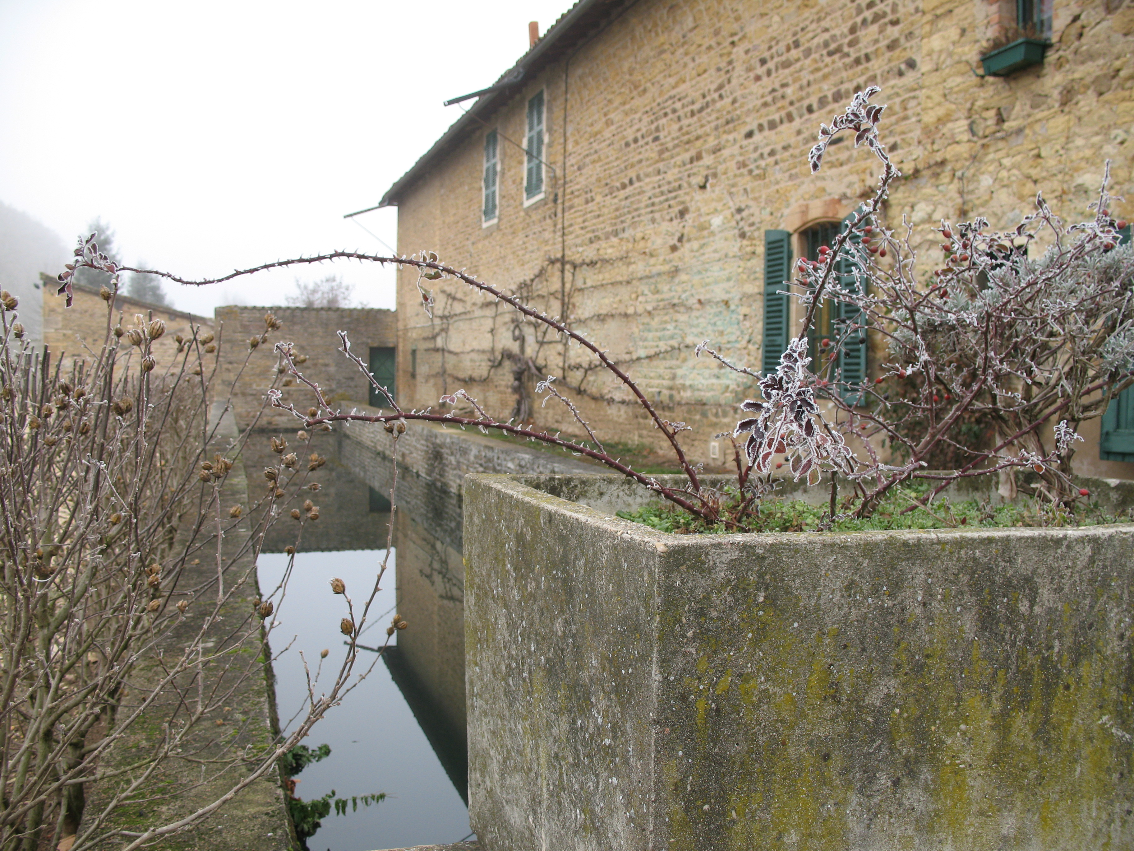 château de Thoiriat (communs) - Crèches-sur-Saône (Saône-et-Loire)